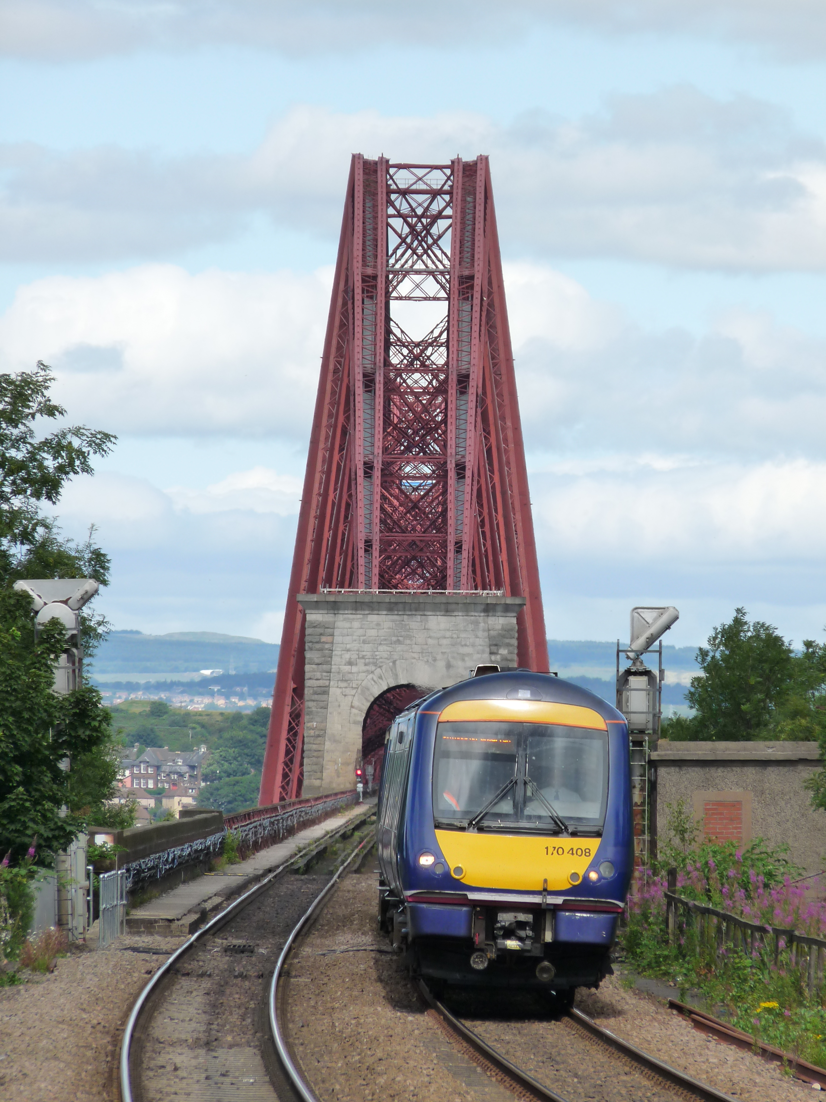 Forth Bridge gezien vanaf station Dalmeny met treinstation Dalmeny